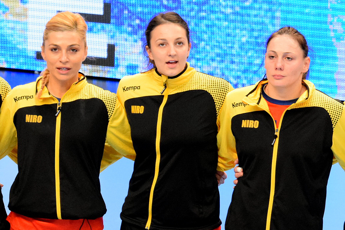 Adriana Nechita, Eliza Buceschi et Melinda Geiger Le 29 novembre 2015, lors du match Roumanie / Cuba pour le compte du TIPIFF 2015. Au stade Pierre de Coubertin à Paris.